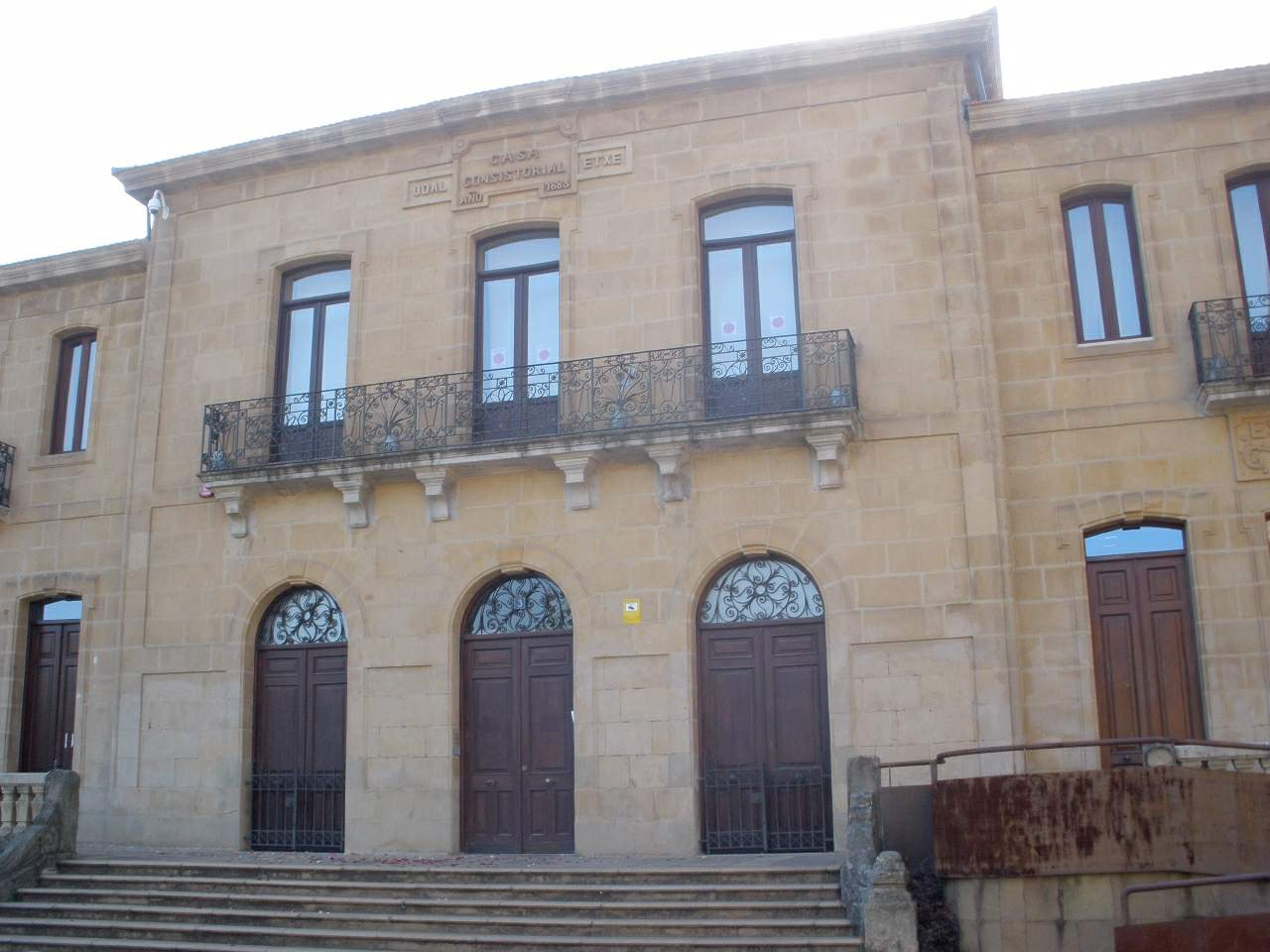 Ayuntamiento de Berango (Vizcaya)